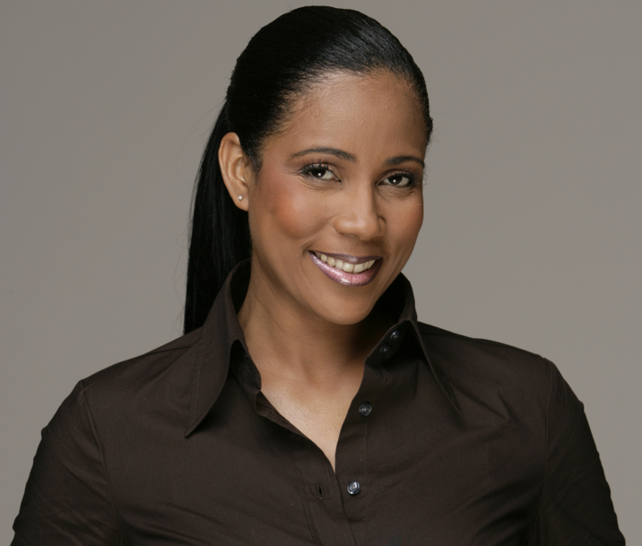 Christine Kelly en 2005.